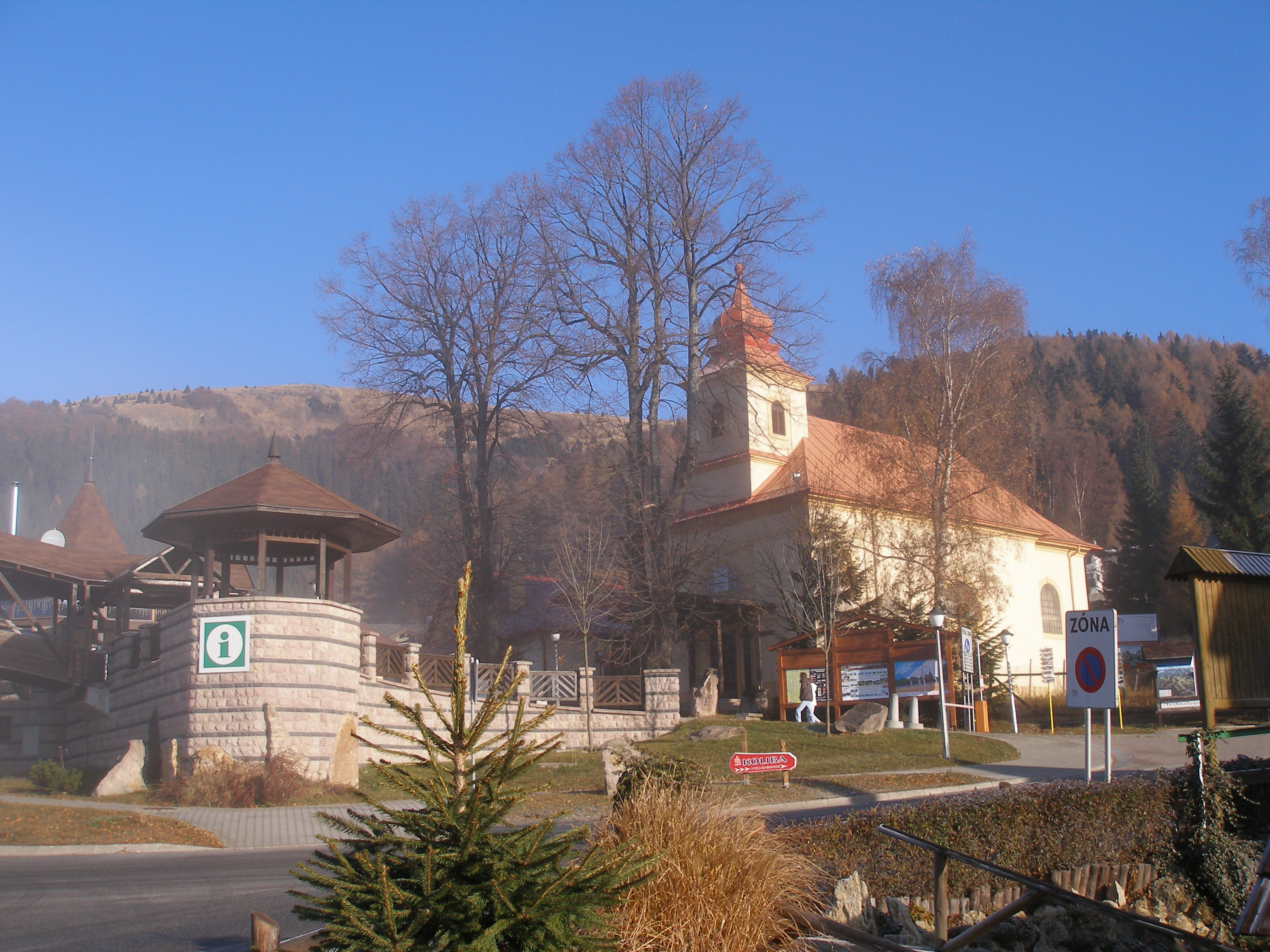 Rekreačné stredisko Donovaly, okres Banská Bystrica